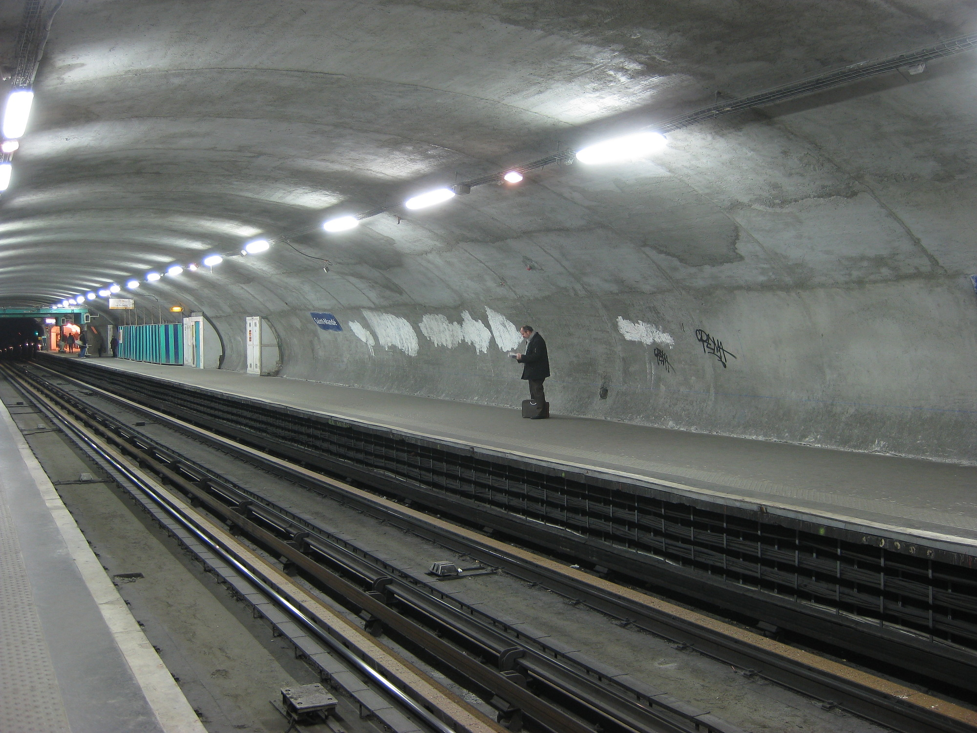 La station de métro parisien Saint-Mandé en cours de rénovation. Les piédroits sont prêts à recevoir le carrelage neuf.